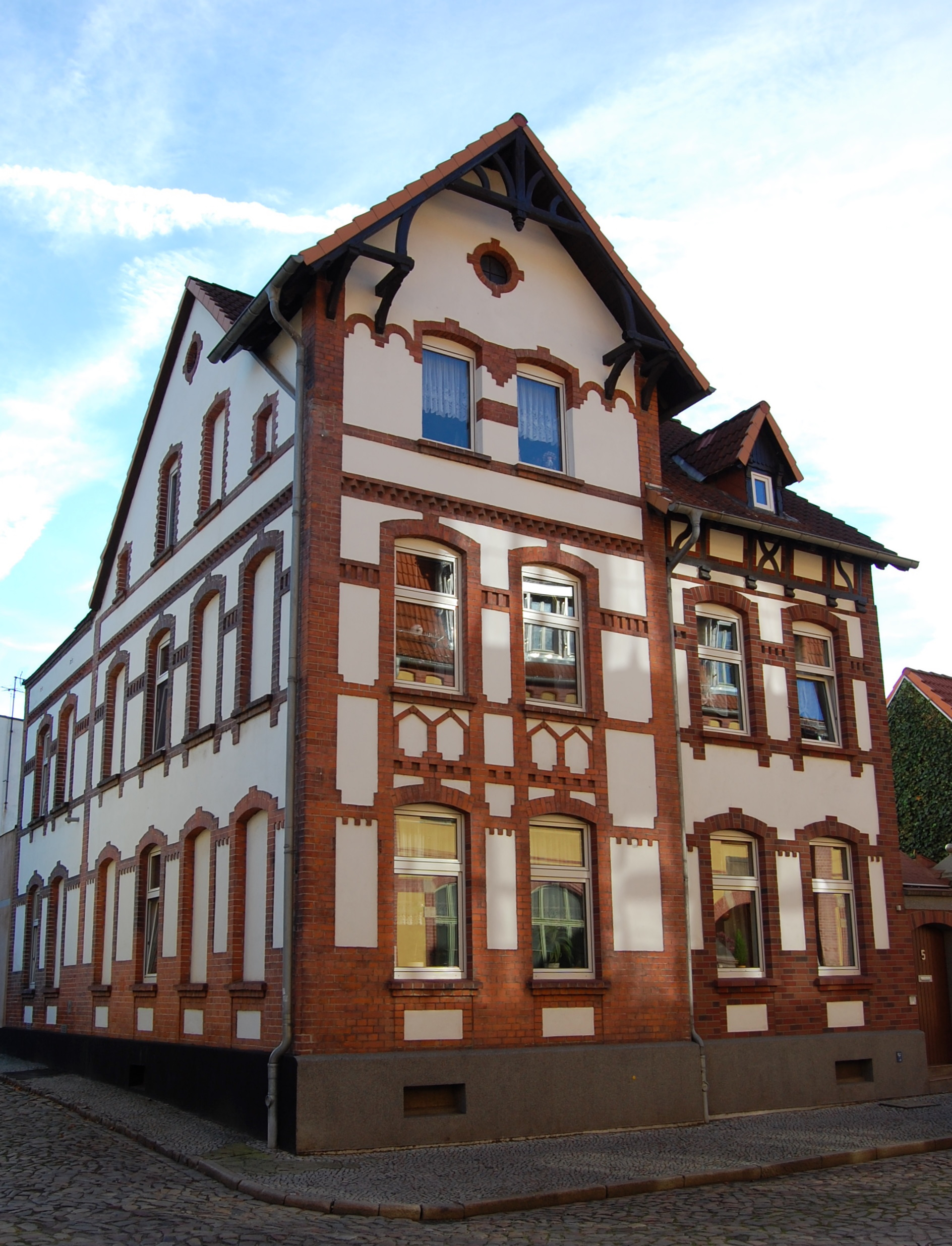 Gebäude Friedhofstraße 5, Kupitzsches Haus, Magdeburg-Salbke